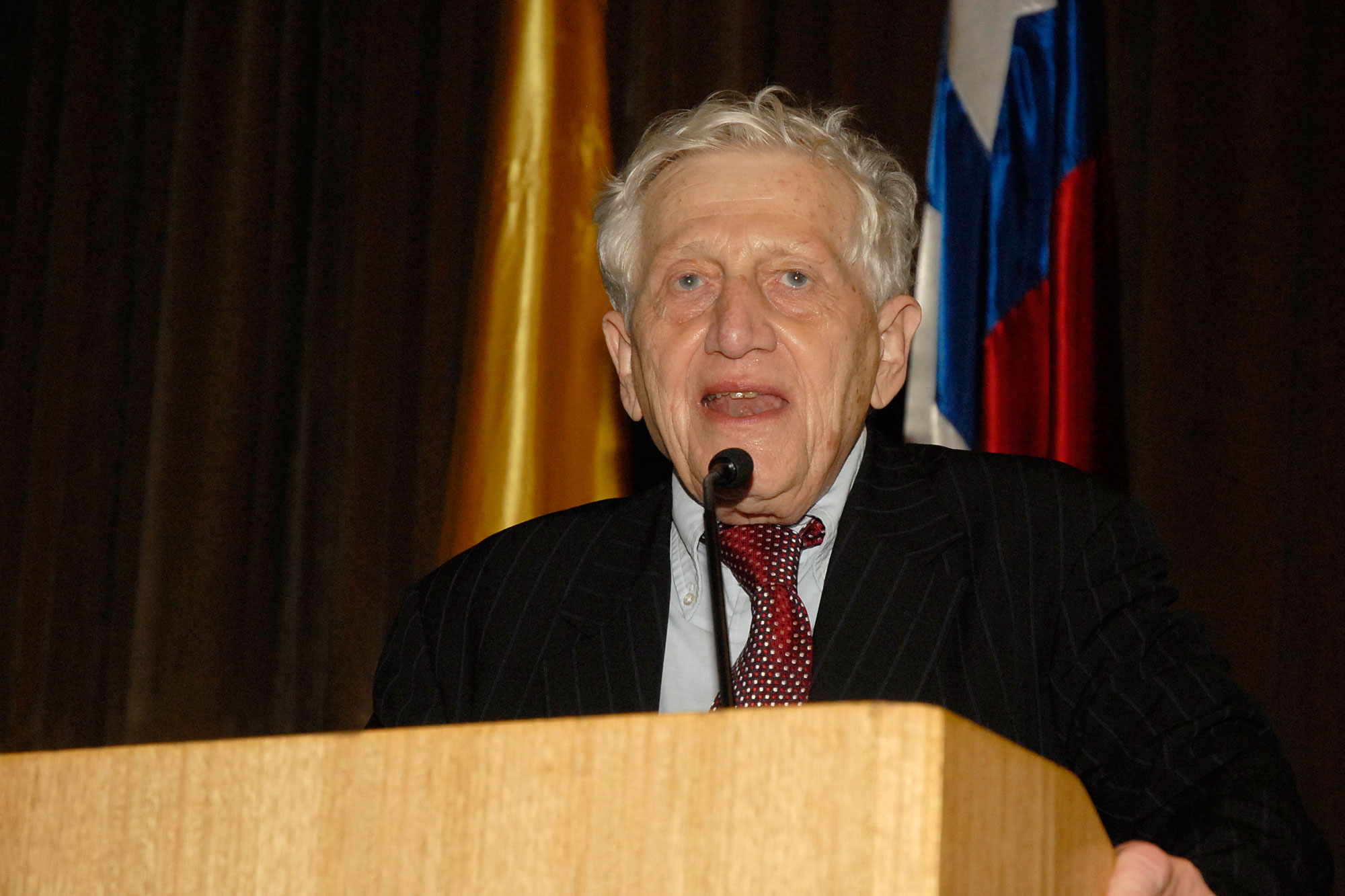 El urbanista Sir Peter Hall destacó interesantes soluciones aplicadas en distintas ciudades del mundo para mejorar su habitabilidad.